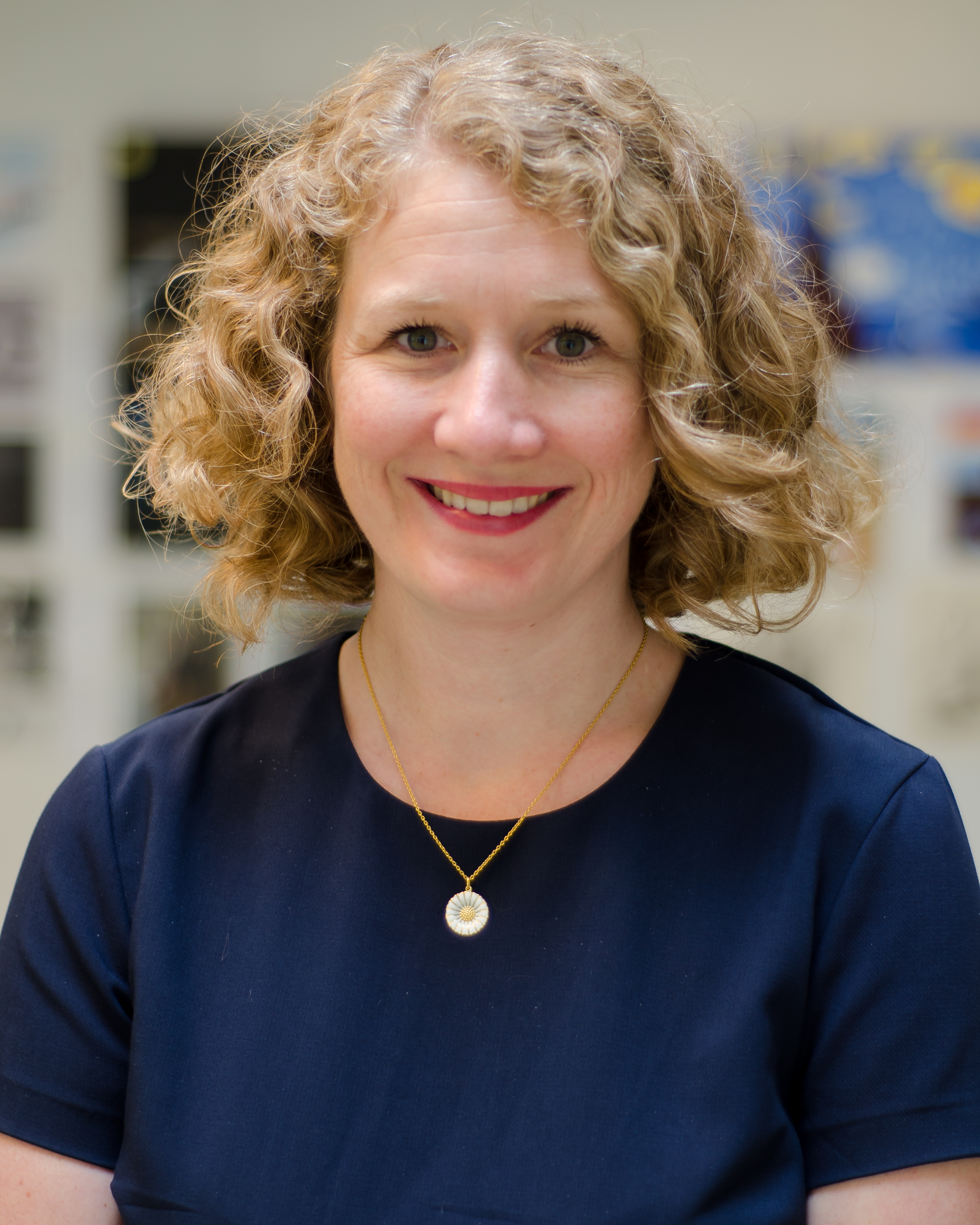 Tuva Moflag, stortingskandidat for Akershus Arbeiderparti